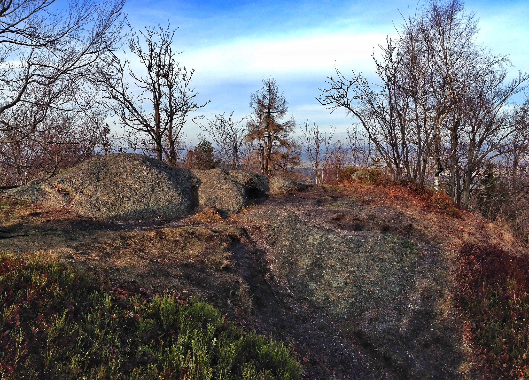 Vrchol Oldřichovského Špičáku (724 m) v Jizerských horách